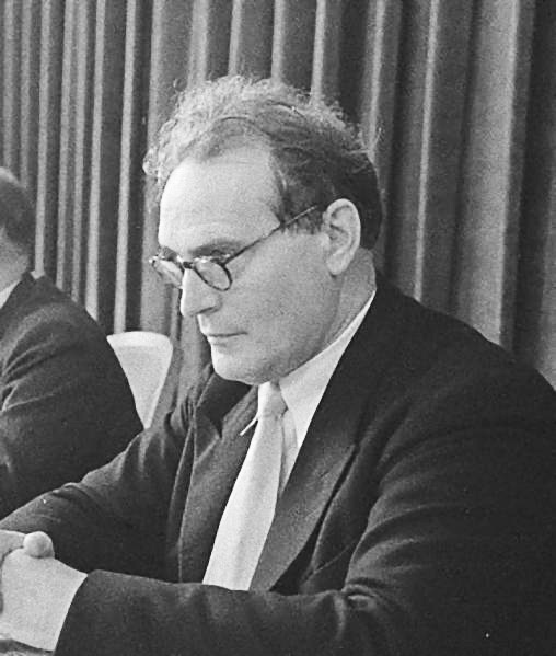 Original image description from the Deutsche Fotothek Podium der Bachfeier, Günther Ramin im Vordergrund